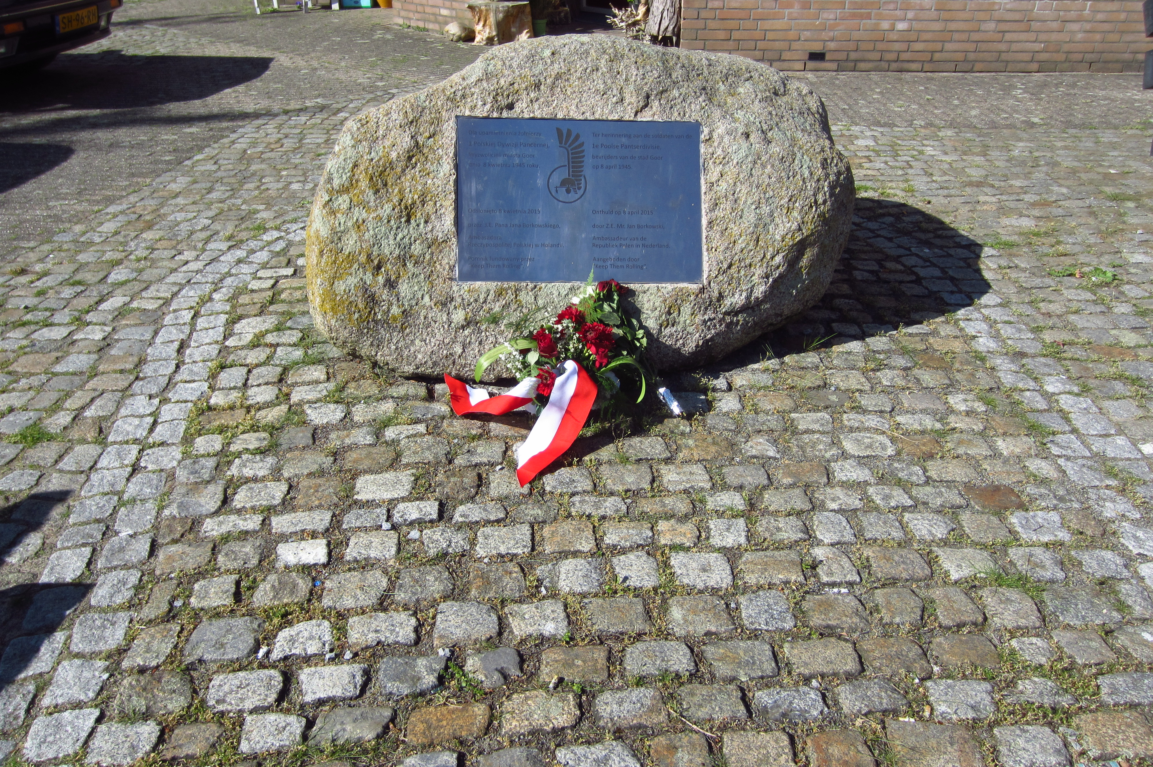 Monument voor de 1e Poolse Pantserdivisie te Goor. Opschrift plaquette in het Pools en het Nederlands, naast het insigne van de divisie: Ter herinnering aan de soldaten van de 1e Poolse Pantserdivisie, bevrijders van de stad Goor op 8 april 1945. Onthuld op 8 april 2015 door Z.E. Mr. Jan Borkowski, Ambassadeur van de Republiek Polen in Nederland. Aangeboden door "Keep Them Rolling".